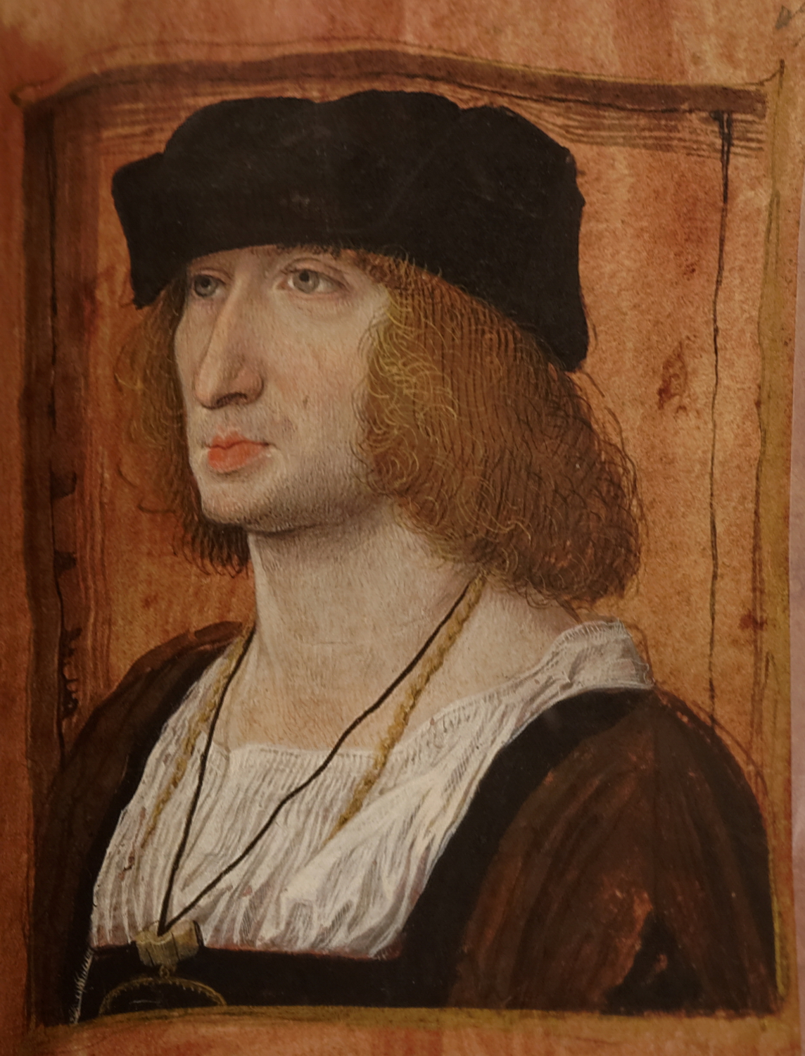 Jean Perréal (connu à Lyon à partir de 1483 – 1530), Portrait de Pierre Sala. Vers 1500. Enluminure sur parchemin. Dans Pierre Sala, Petit Livre d’Amour, manuscrit sur parchemin et papier. Londres, The British Library